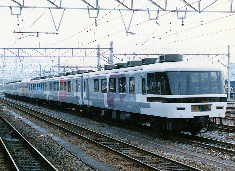 JR西日本 12系・14系和風客車「あすか」